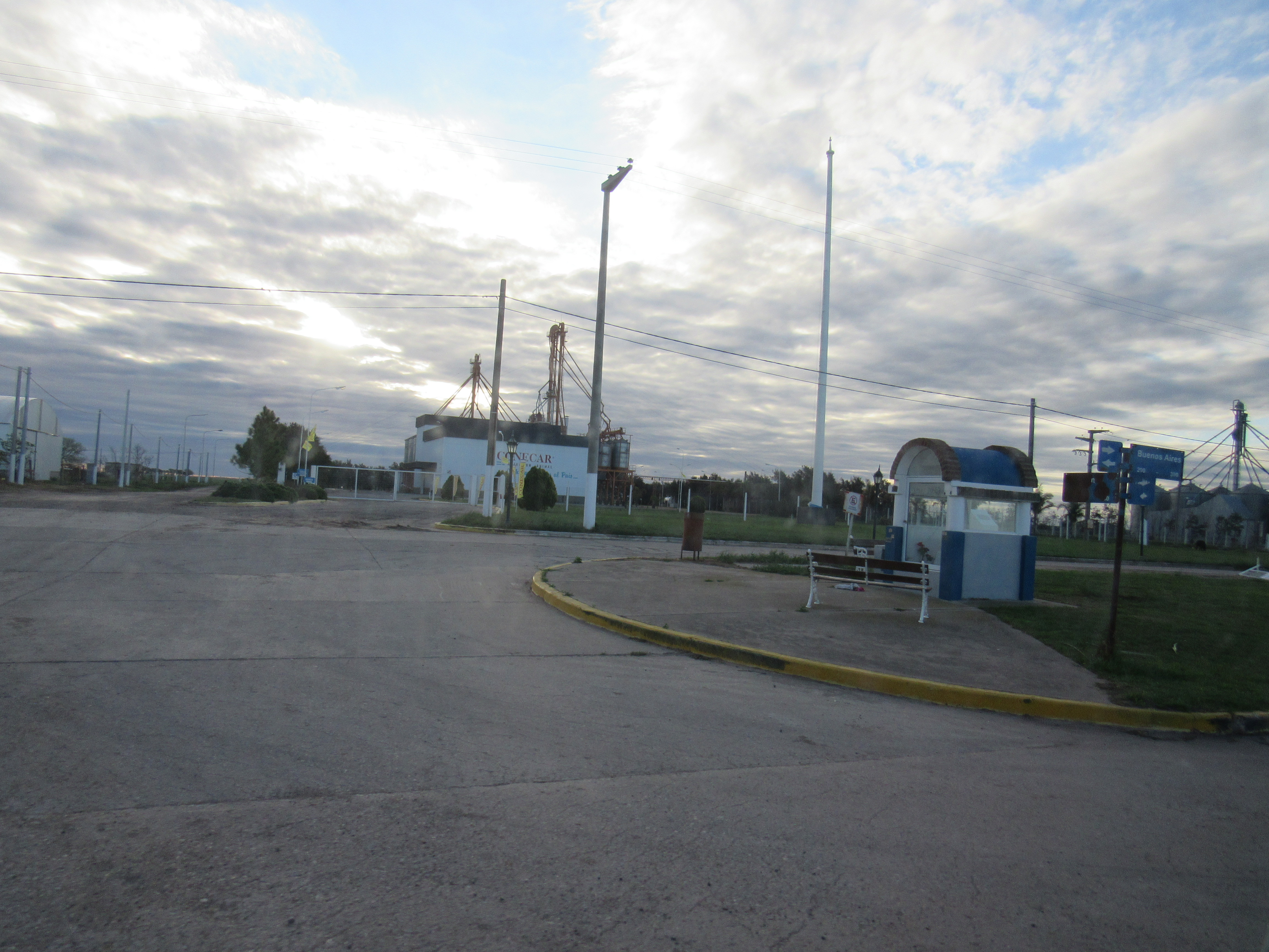 Ausonia, Córdoba, Argentina, desde la Ruta Provincial 4